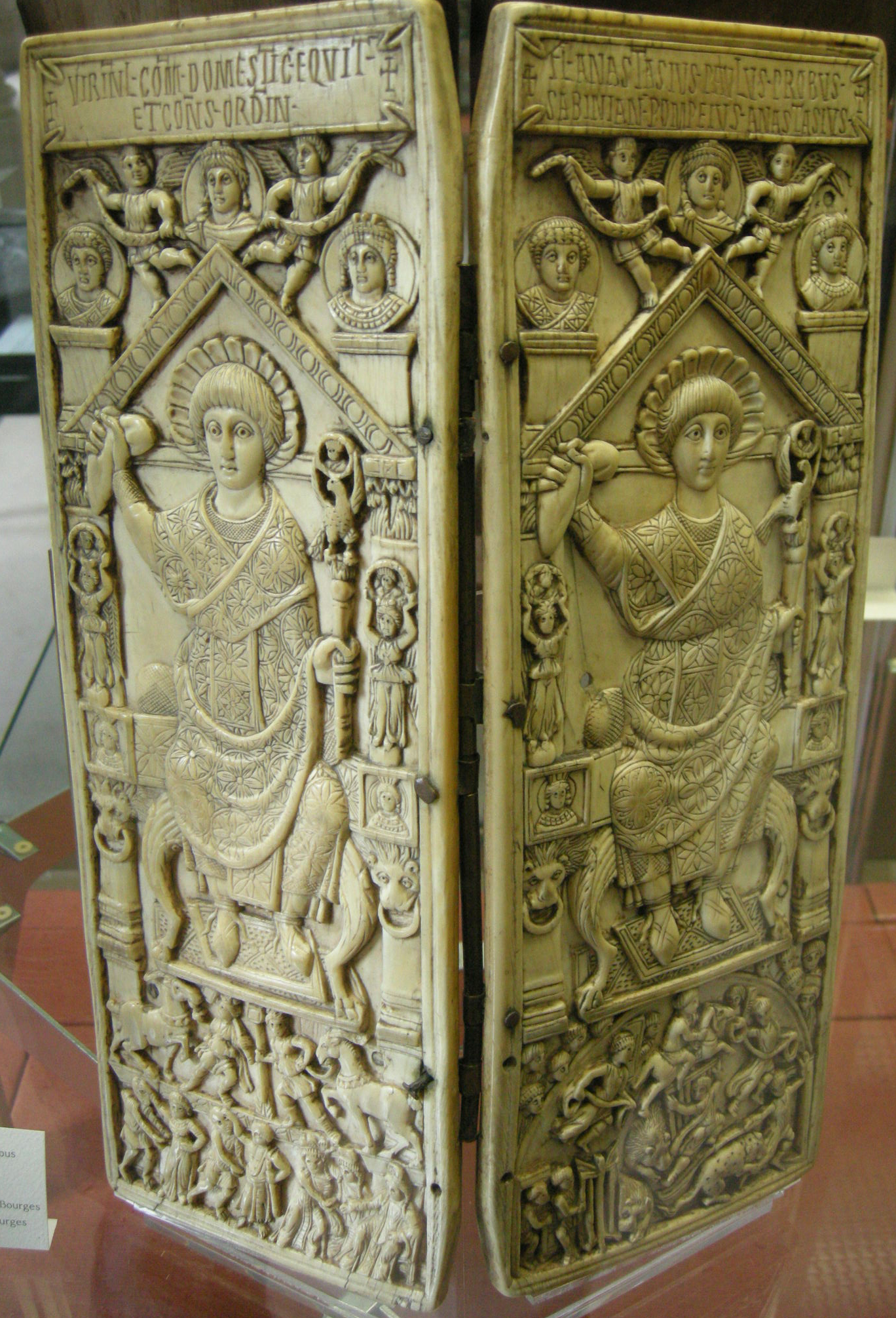 CdM, ditico di flavio anastasio probo, 517